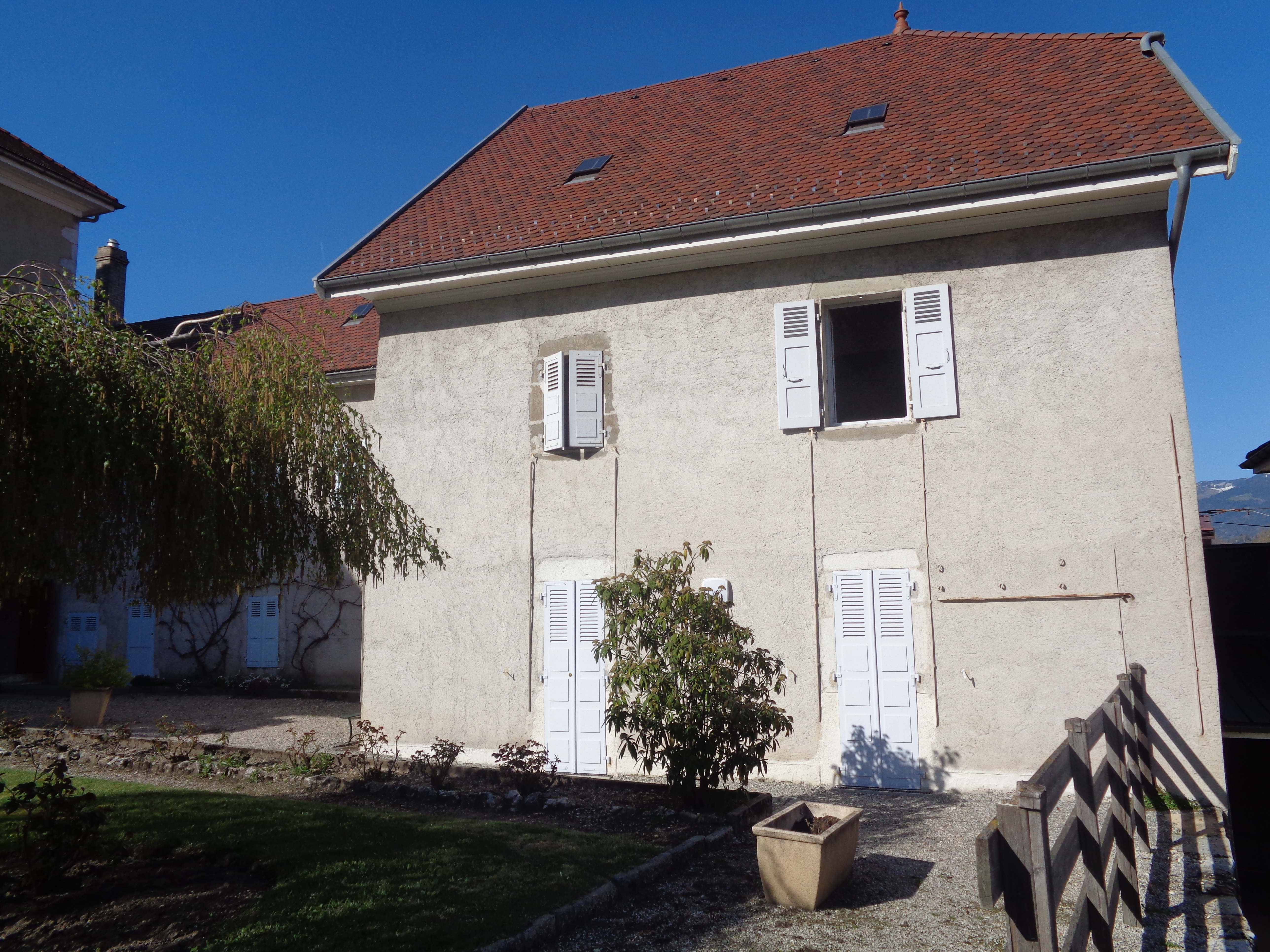 Vue de la partie ancienne de la Maison dite "de la Galerie" à Annecy, ou à été fonder l’ordre de la Visitation Sainte-Marie en 1610.